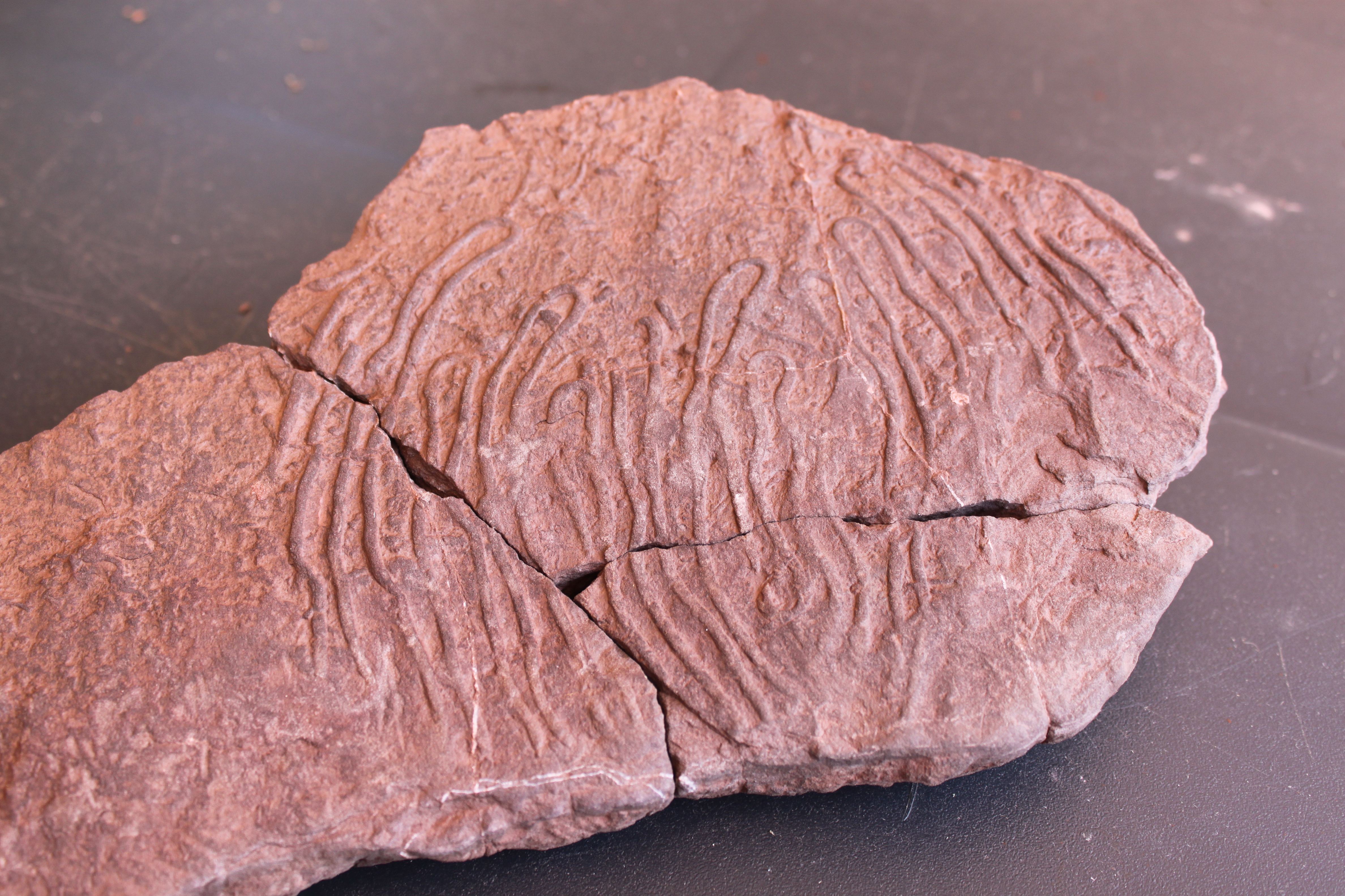 Icnofósil Helminthorhaphe (Seilacher, 1977) en arenisca de los flyschs de punta San García. Complejos del Campo de Gibraltar, Unidad de Algeciras (Oligoceno-Mioceno). Algeciras, Andalucía, España.